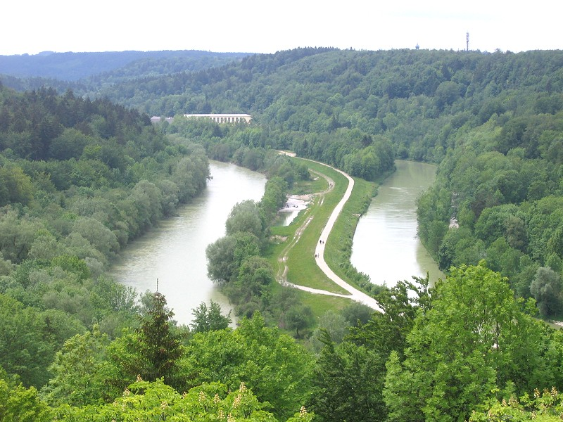 Isar bei Gruenwald